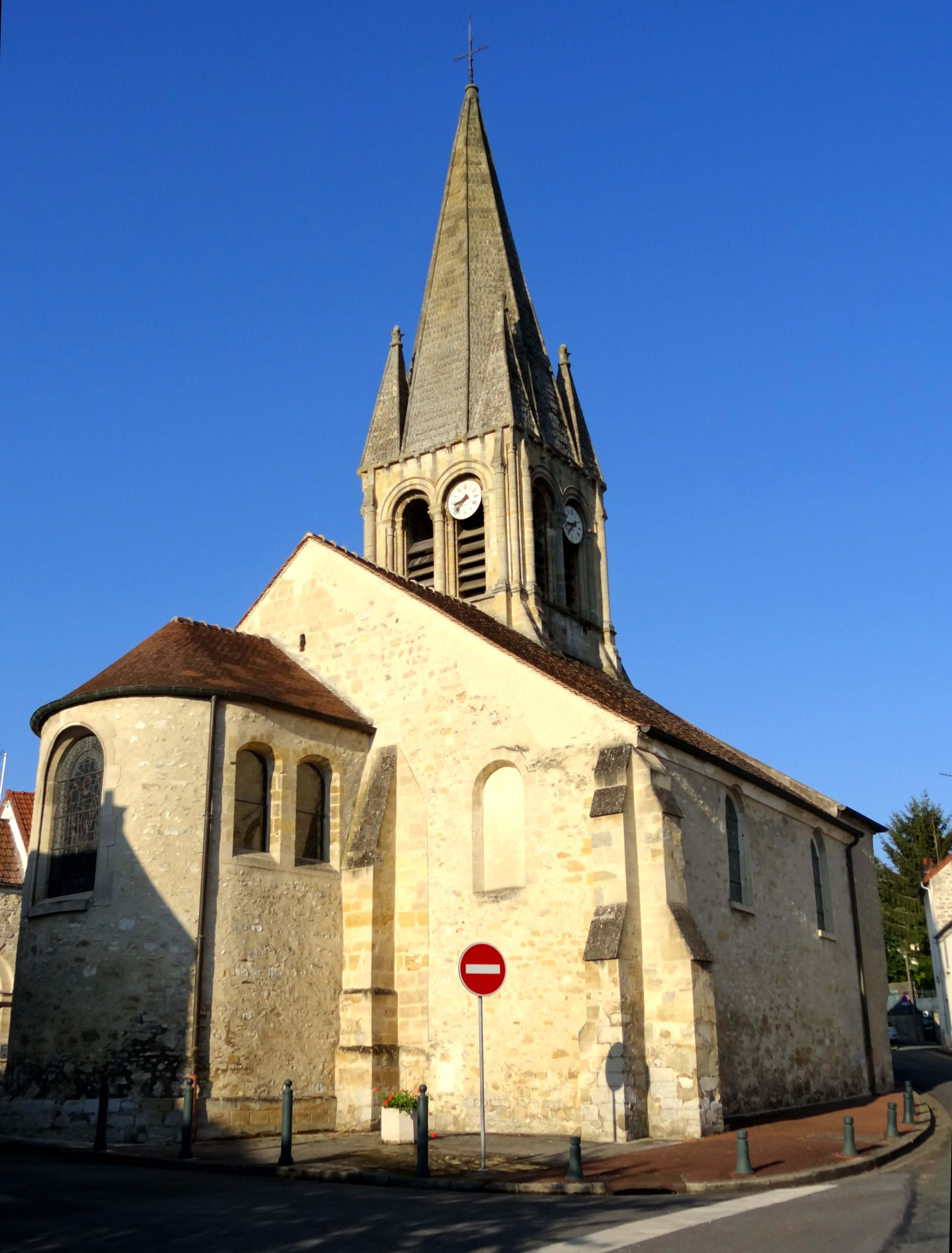 Église Saint-Germain-de-Paris de Hardricourt - voir titre.